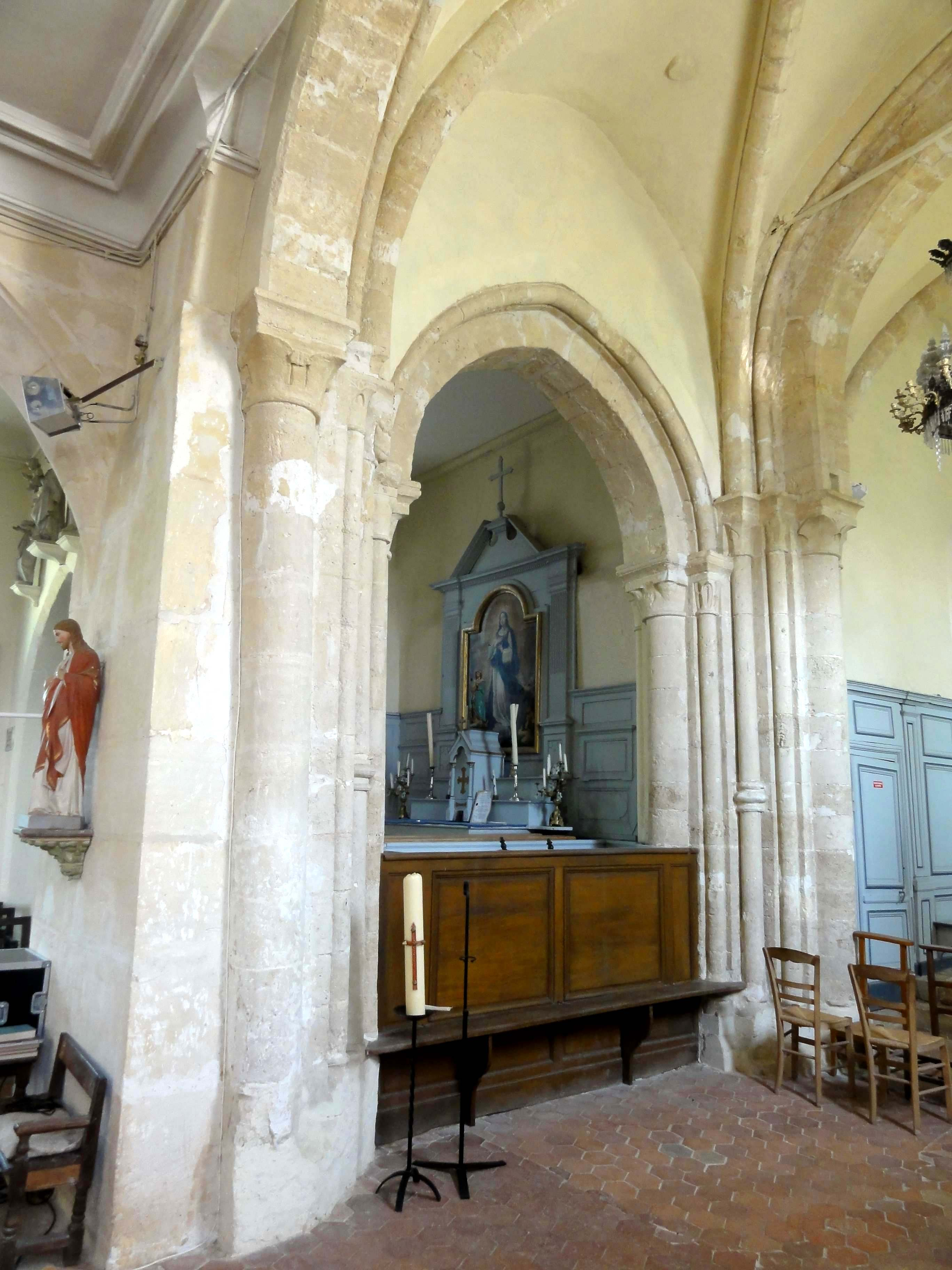 Intérieur de l'église - voir titre.